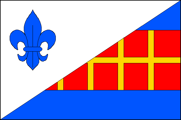 vlajka, Korolupy, okres Znojmo